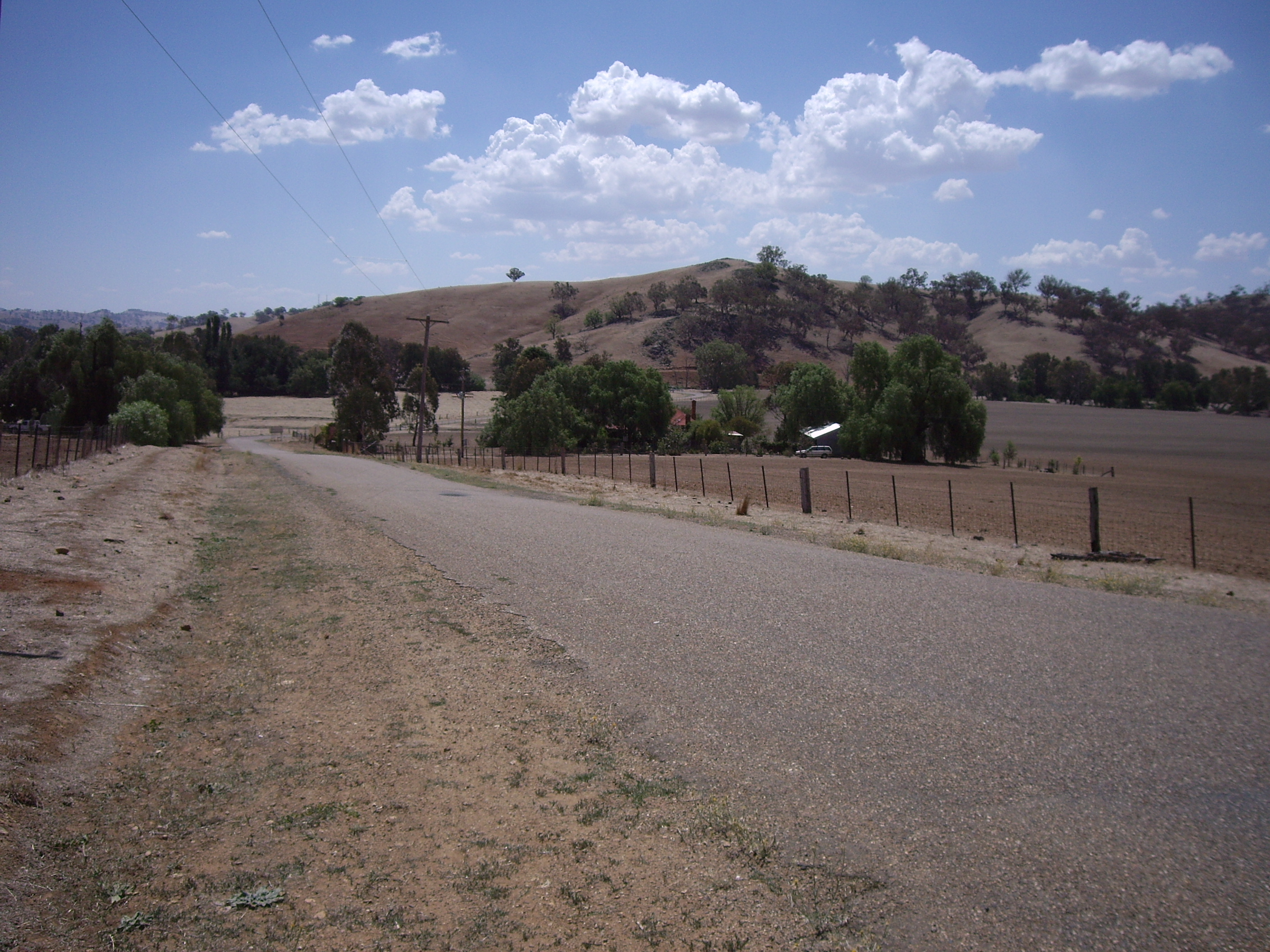 Darbalara